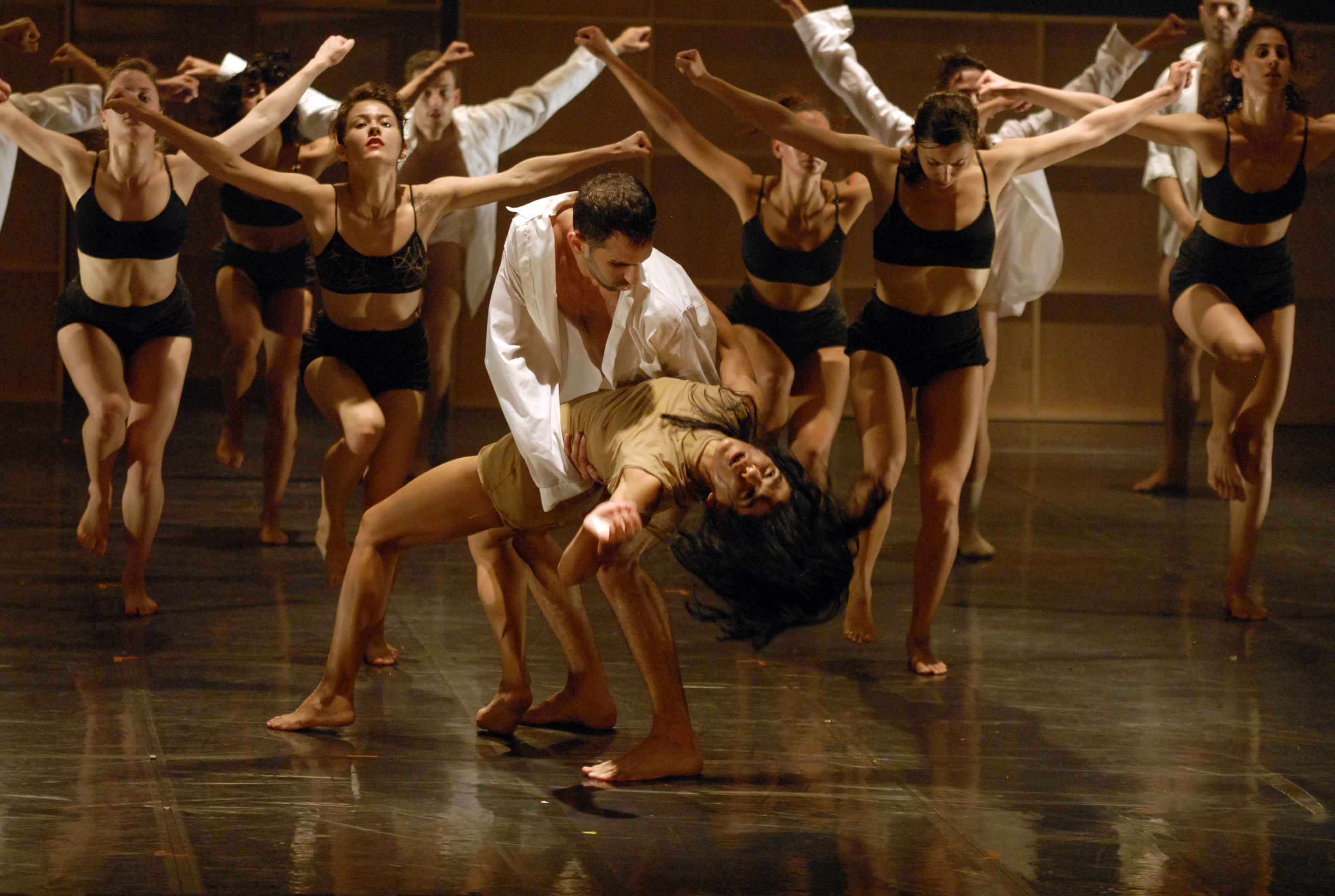 מופע של להקת המחול הקיבוצית